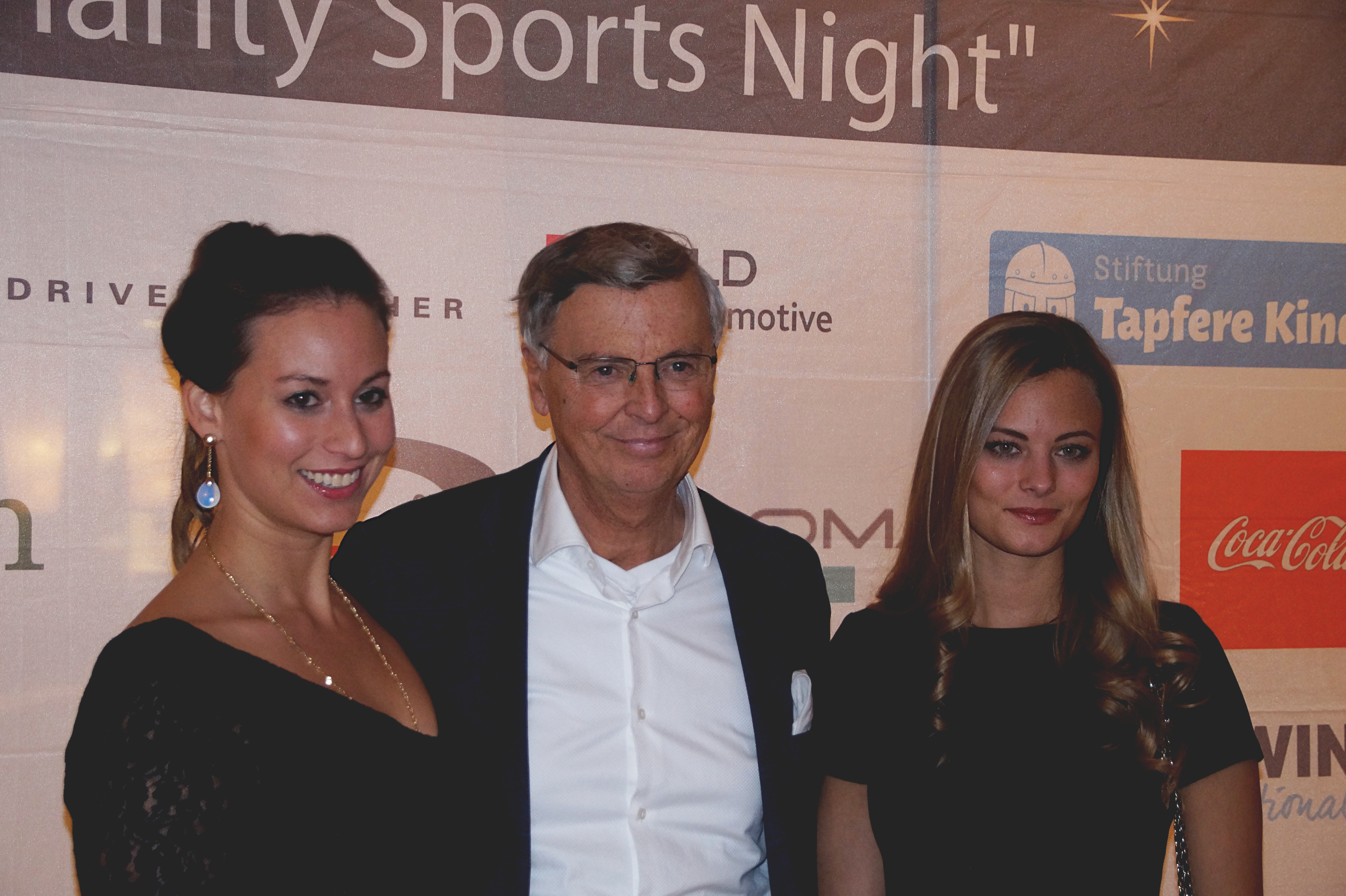 Wolfgang Bosbach mit Töchtern Caroline und Viktoria bei der "Kölner Charity Sports Night", am 27.11.2016 im Kölner Dorint Hotel.